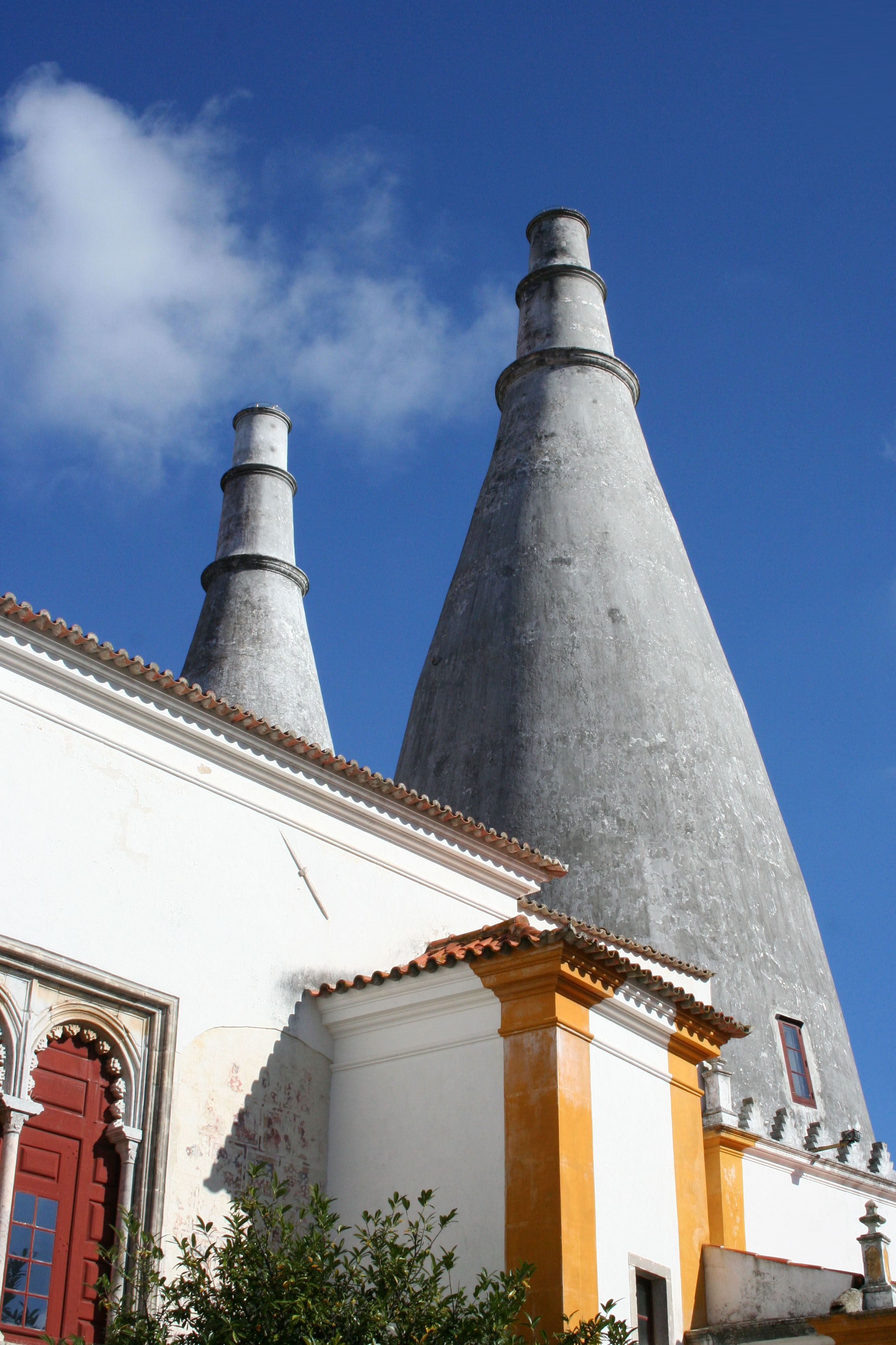 Palácio Nacional de Sintra ou Palácio da Vila